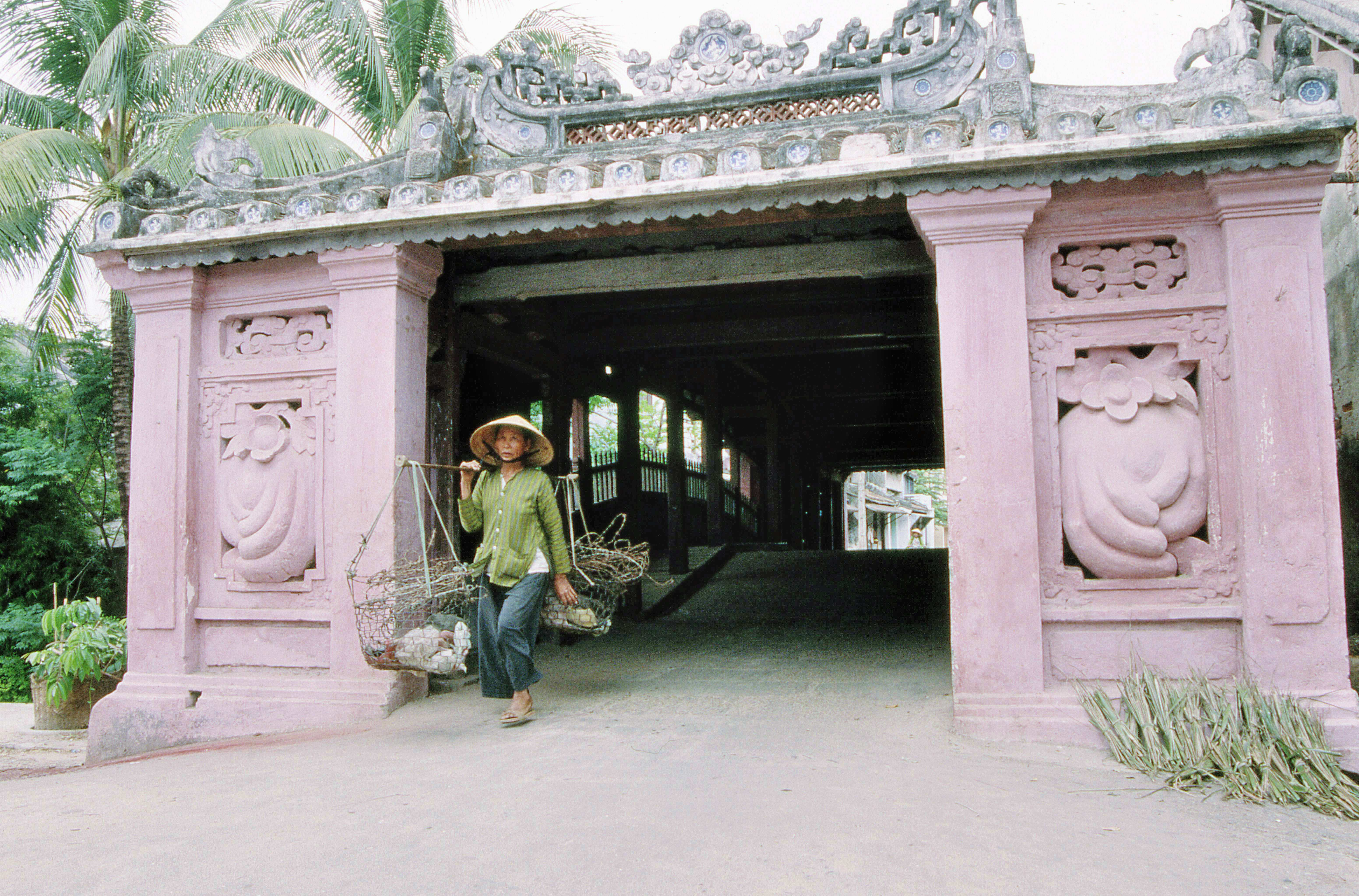 Hoi_-an_498.jpg nikon f 801